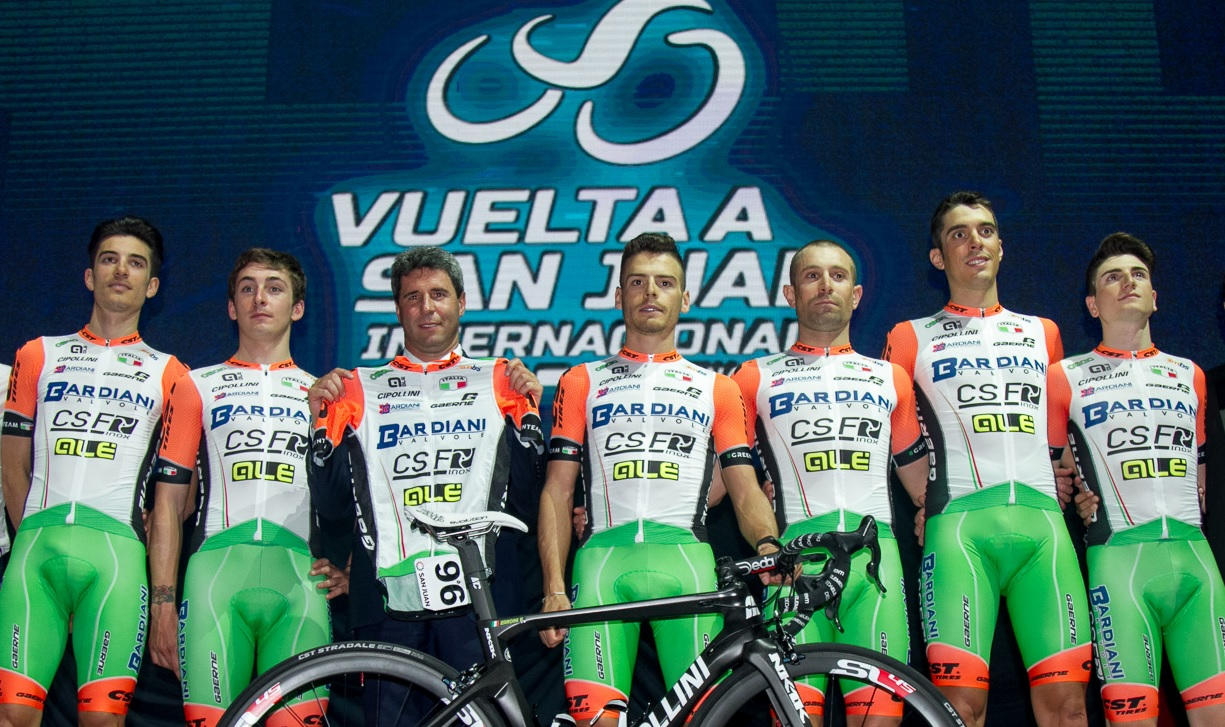 Vuelta a San Juan 2017 - Bardiani CSF (Italia) Depicted team: Bardiani CSF